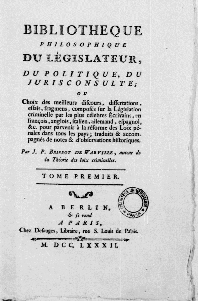 Frontespizio